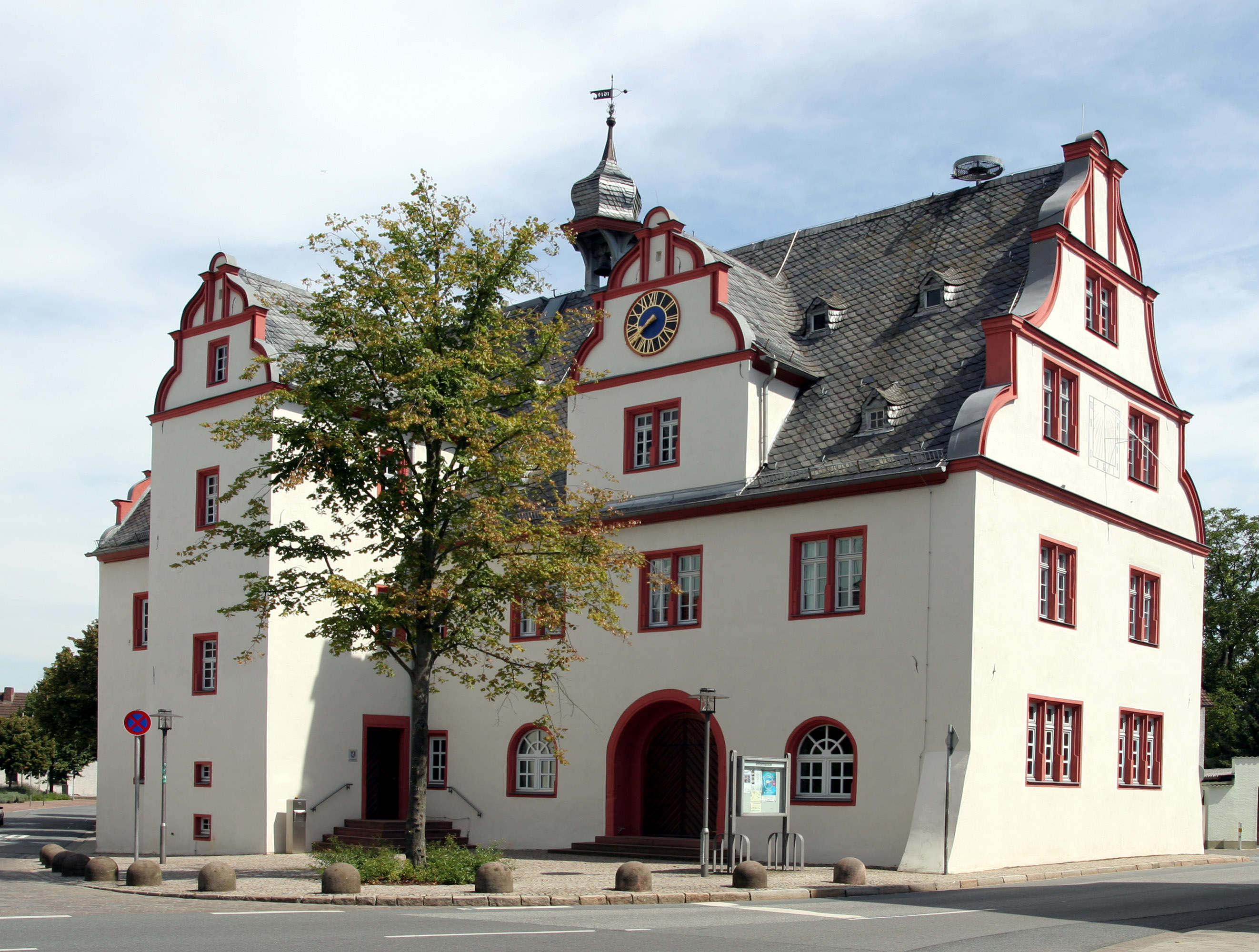 Das Alte Rathaus von Pfungstadt.